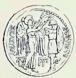 Tetradrachmon des Seleukos I. Nimator (306–280). Vorderseite: Kopf des Seleukos. Rückseite: Nike bekränzt ein Tropaion.